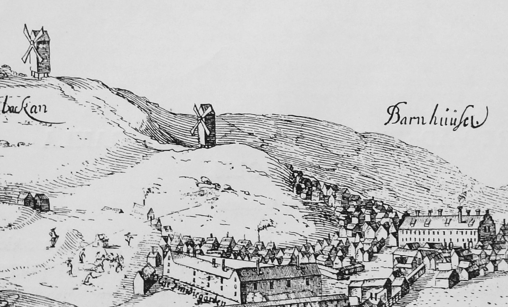 Detalj av von Vogels kopparstick över Stockholm från Skinnarviksbergen 1647, t.v. Rörstrands-, t.h. Barnhuskvarnen